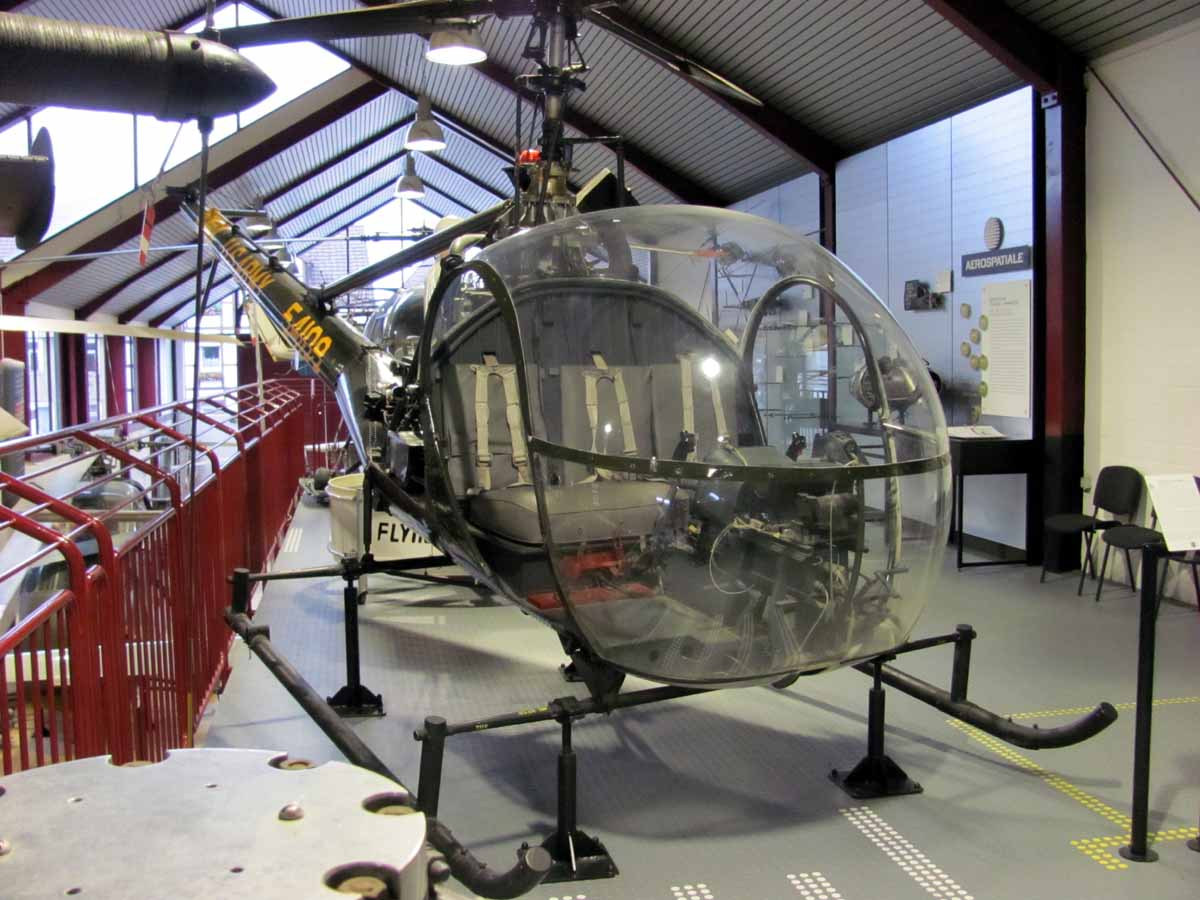 Hiller H-23 Raven, fotografiert im Hubschraubermuseum Bückeburg